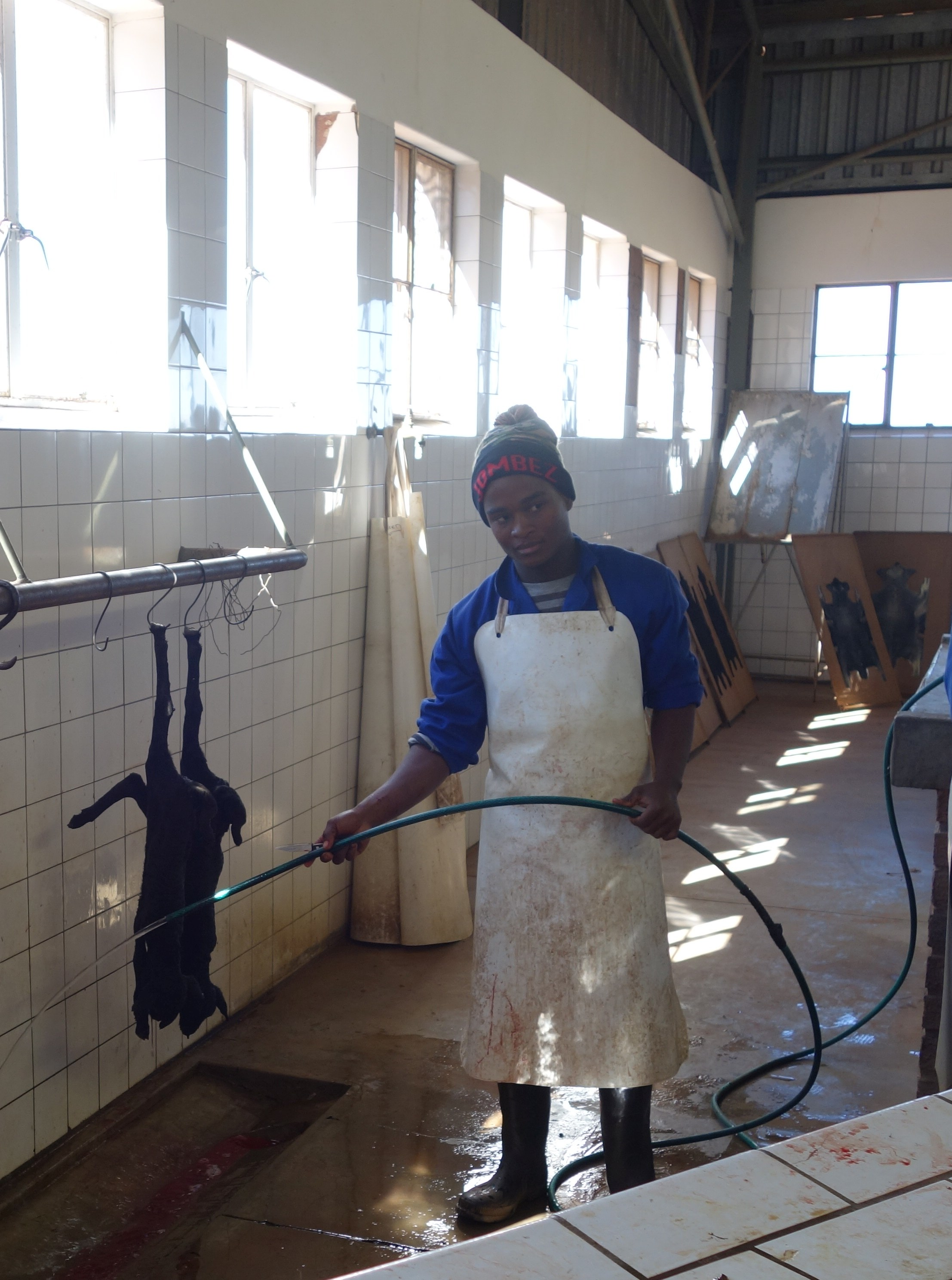 Namibia, Tivoli-Farm. Waschen eines eben geschlachteten Swakara-Lamms.